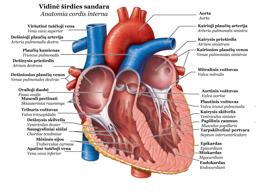 hjfkasjfkla